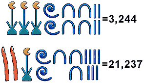 Egipatski brojevi 2